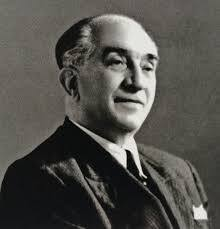 Augusto Rebelo Arruda